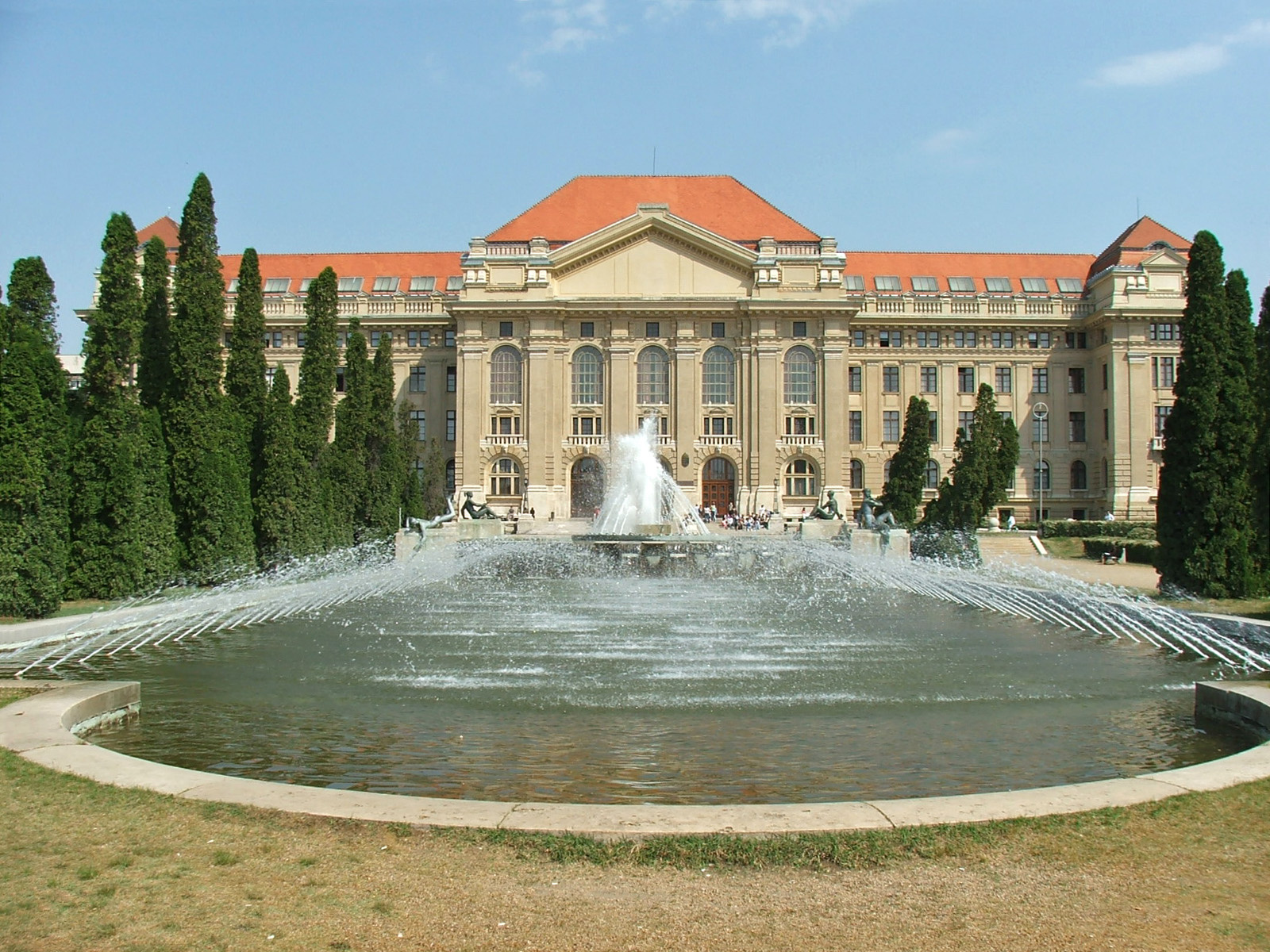 Kossuth Lajos Tudományegyetem épülete (Debrecen, Nagyerdei krt., Egyetem tér 1.) This is a photo of a monument in Hungary, Identifier: 5228